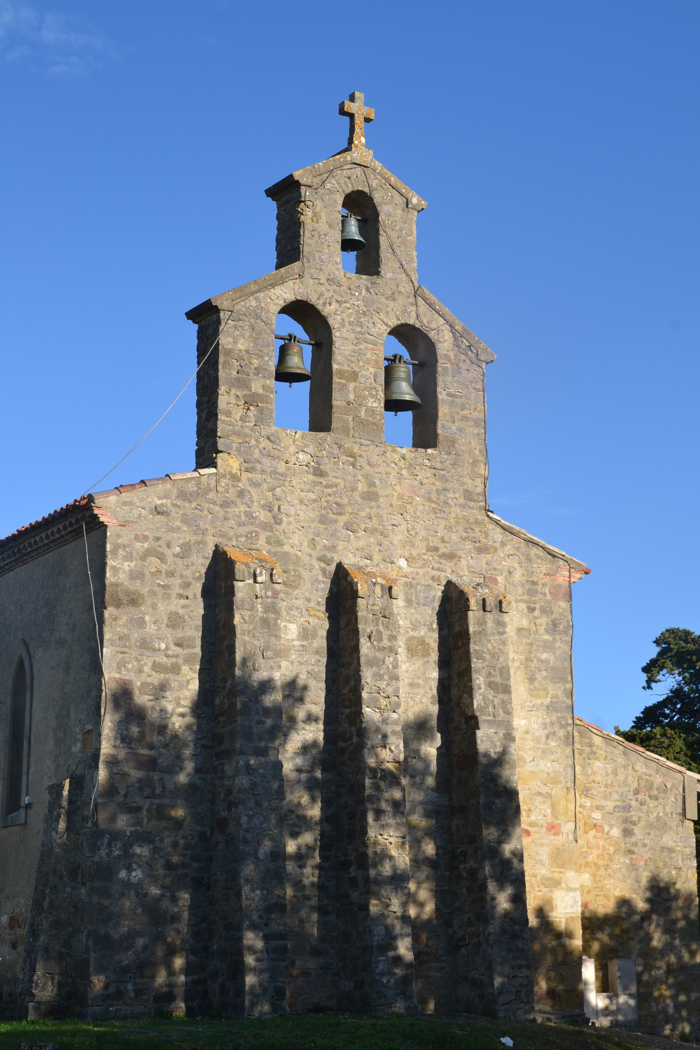 L'église Sainte-Marie de Malegoude (Ariège, France).